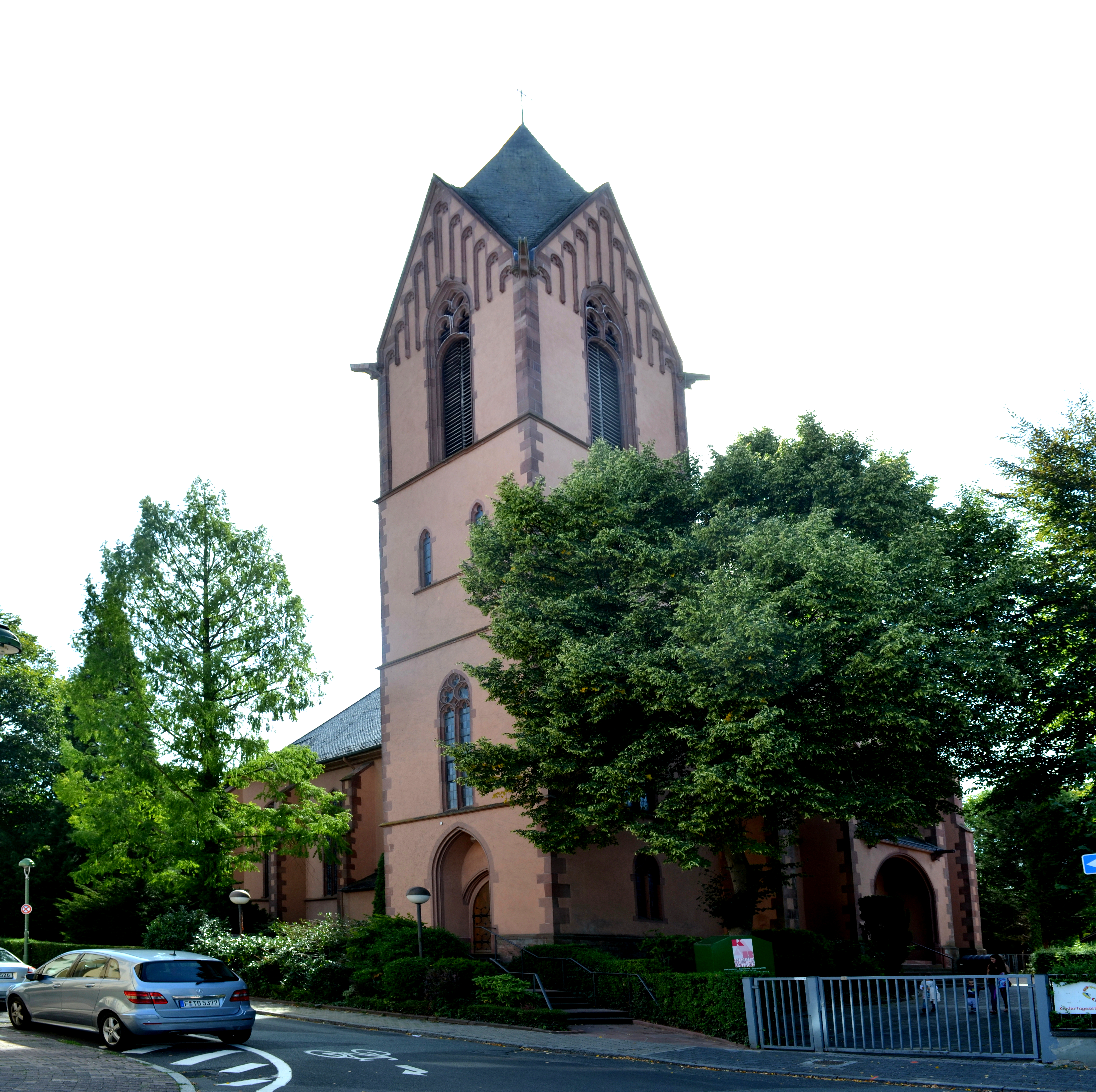 Oberrad, Herz-Jesu-Kirche